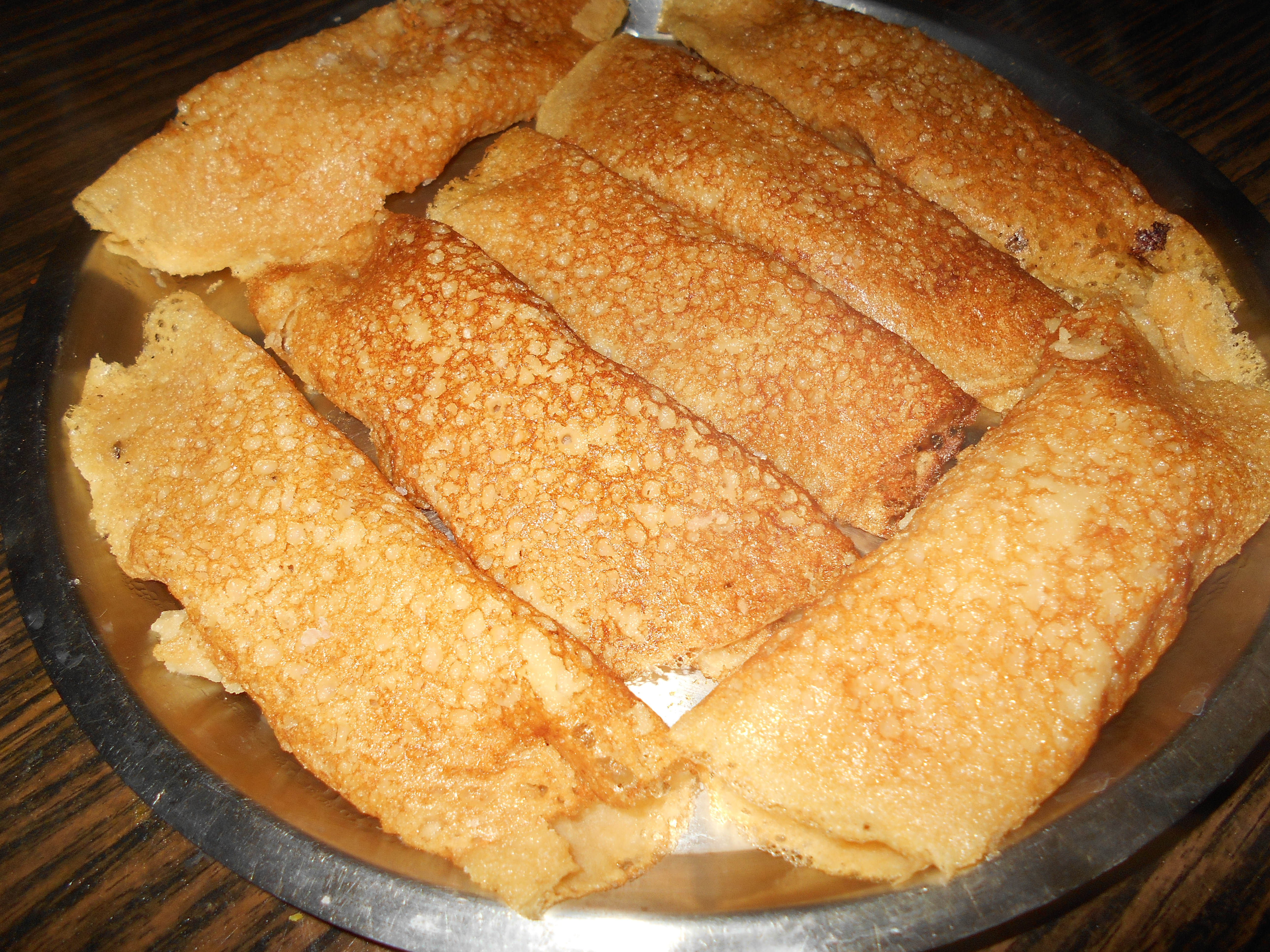 গুড়ের পাটিসাপটা